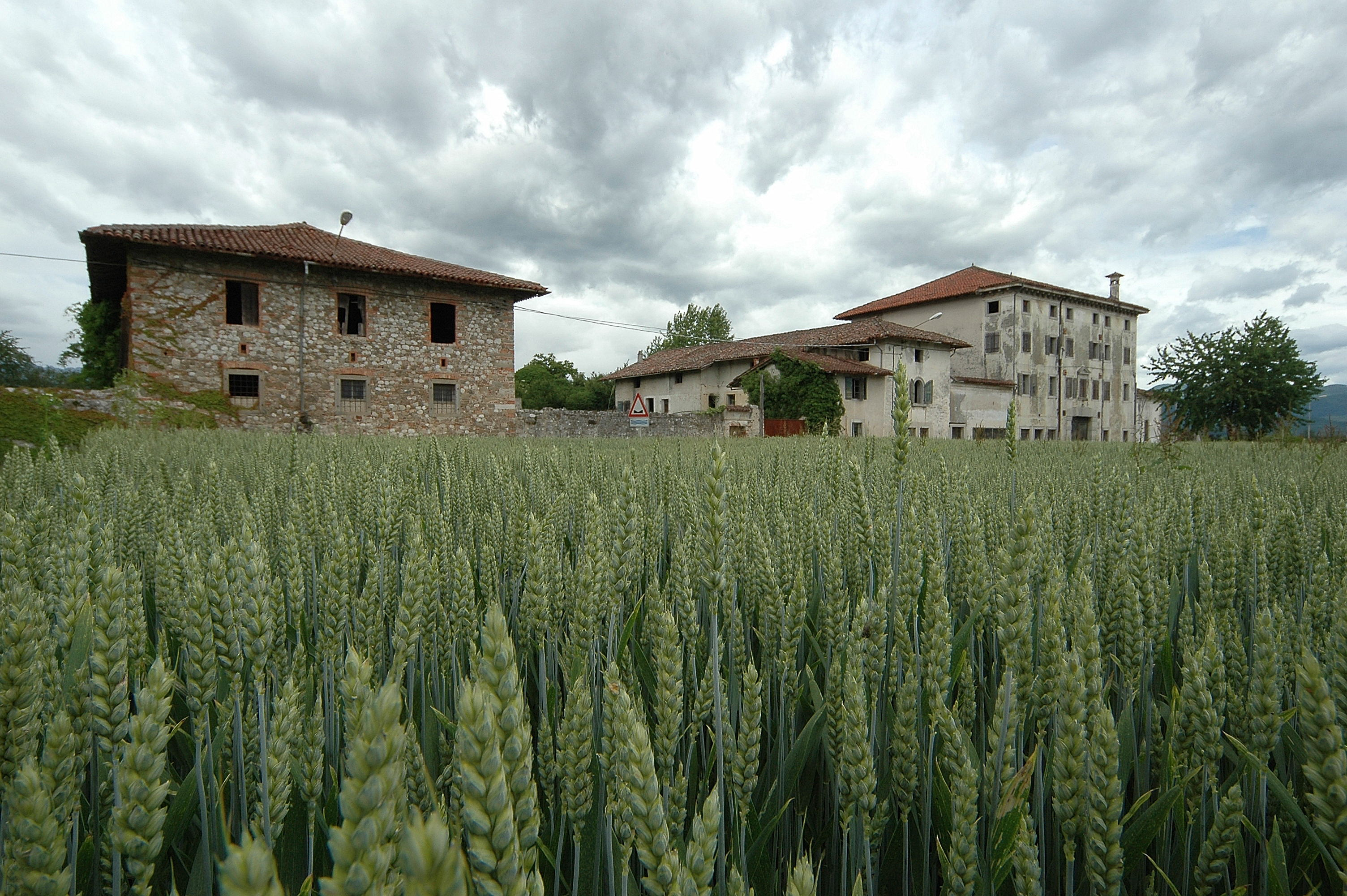 Reana del Rojale, Udine, Friuli, Italia